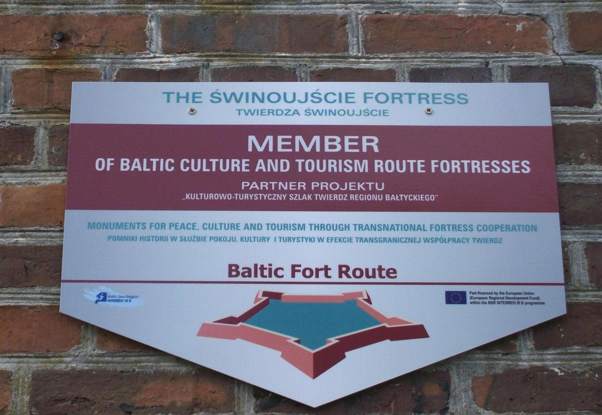 Tabliczka "Twierdza Świnoujście".